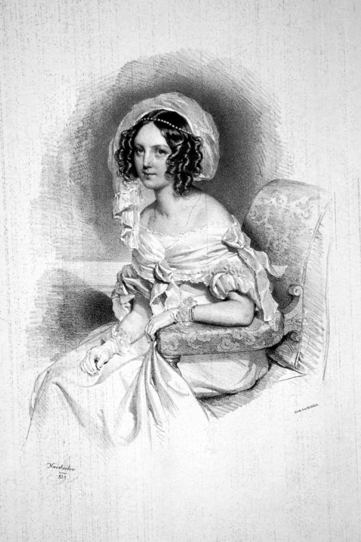 Antonie Gräfin Seilern, geb. Freiin Krosigk (1811-1877), . Lithographie von Josef Kriehuber, 1839